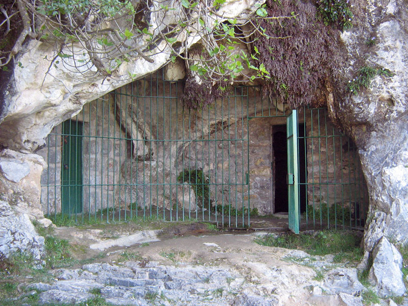 Punto de acceso a la Cueva de Covalanas (Cantanbria). La verja protege la temperatura de la cueva, algo alterado por el gran número de visitas que acoge.